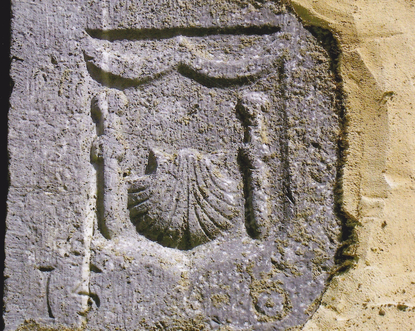 Nestier (Hautes-Pyrénées, France). La pierre jaquaire de 1362.